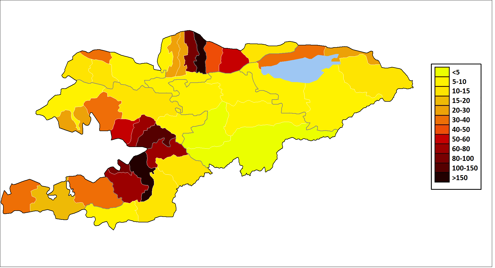 Население Киргизии за 2015